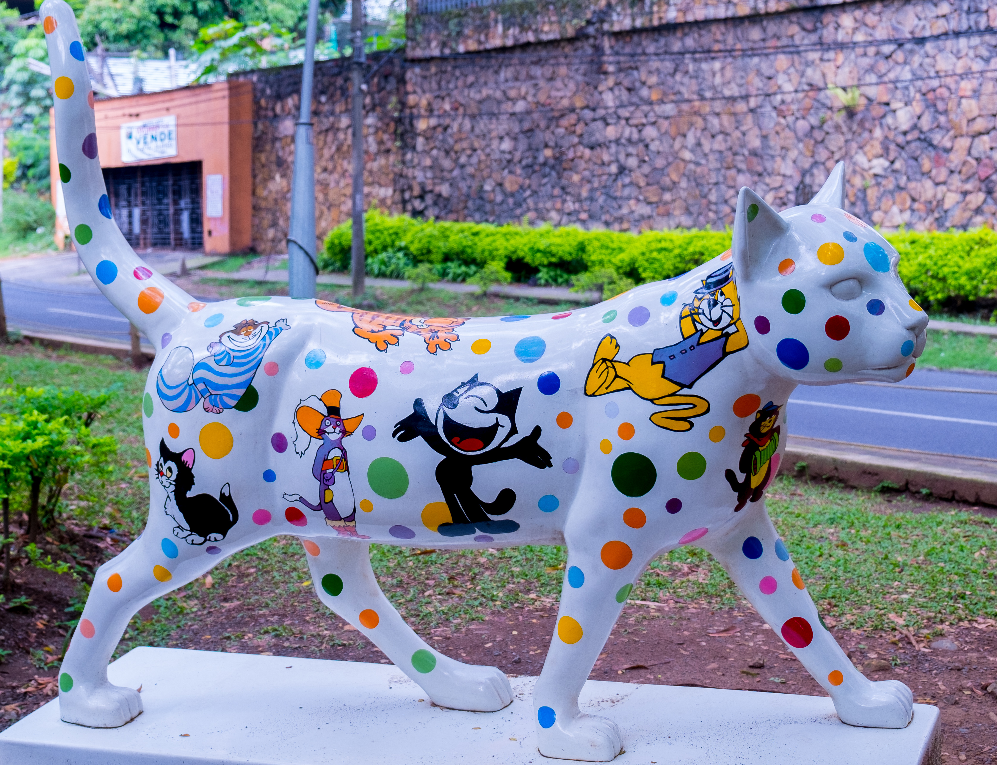 Las Novias del Gato2